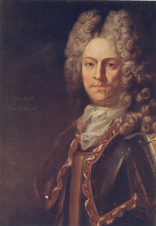 Jean Baptiste, comte d'Oultremont